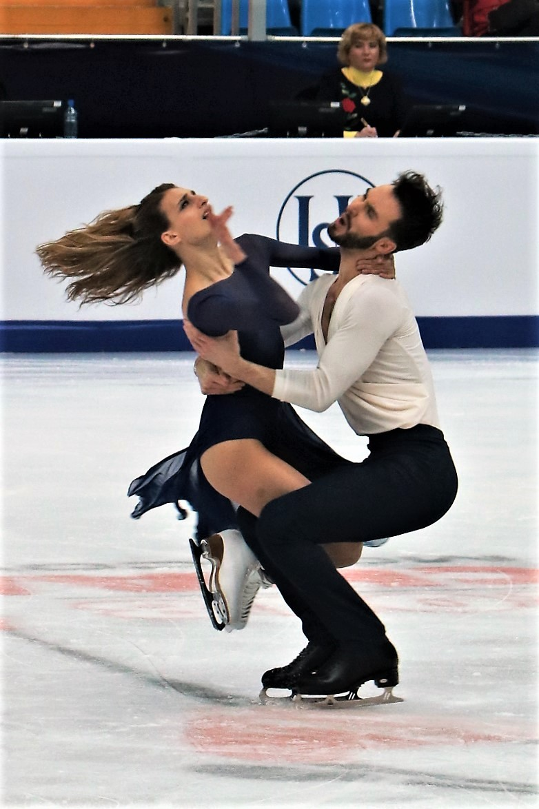 Габриэлла Пападакис / Гийом Сизерон (Франция) на Чемпионате Европы по фигурному катанию 2018.